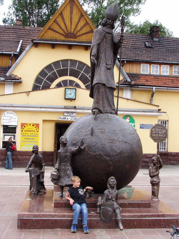 Pomnik św. Mikołaja przed stacją kolejową w Rabce